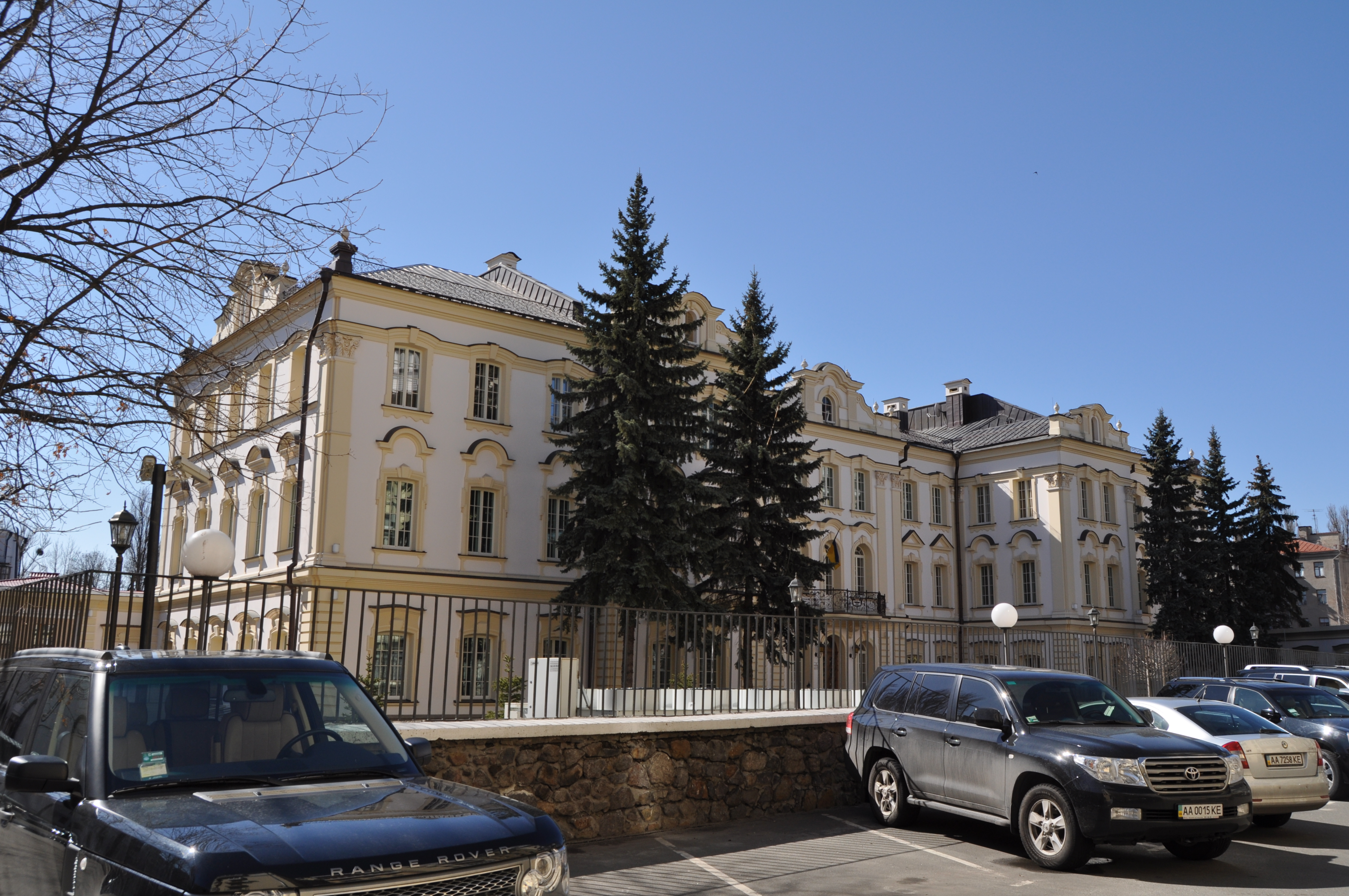 Палац Кловський, Київ, Орлика Пилипа вул., 8